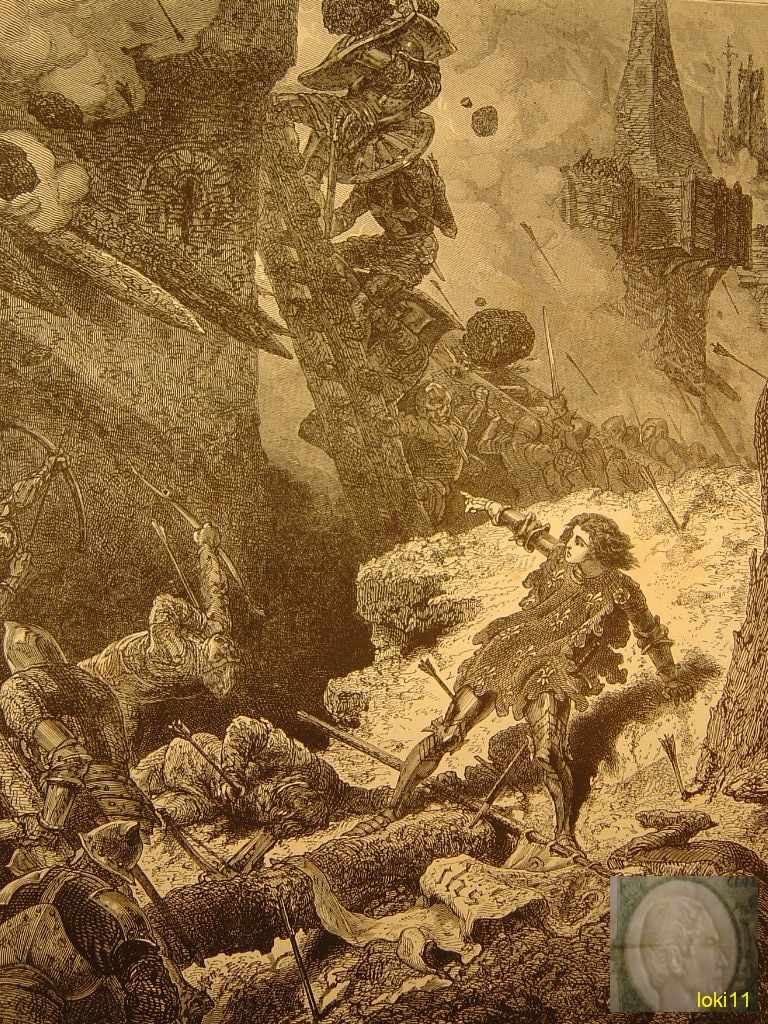 Jeanne d'Arc au siège de Paris